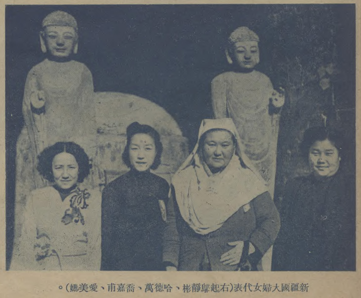 中文（中国大陆）: 新疆國大婦女代表烏靜彬哈德萬喬嘉甫愛美娜